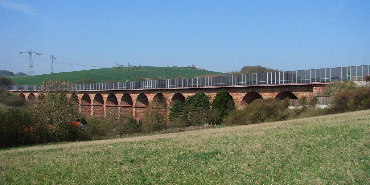 Wommen sanierte alte Talbrücke Autobahn 4 A4 E40 Sandstein 1. Brücke 1940 Bogenbrücke mit 17 Feldern Buntsandstein-Bögen - Neubau 2. Brücke 1993 Foto 2009 Wolfgang Pehlemann Wiesbaden IMG_2616